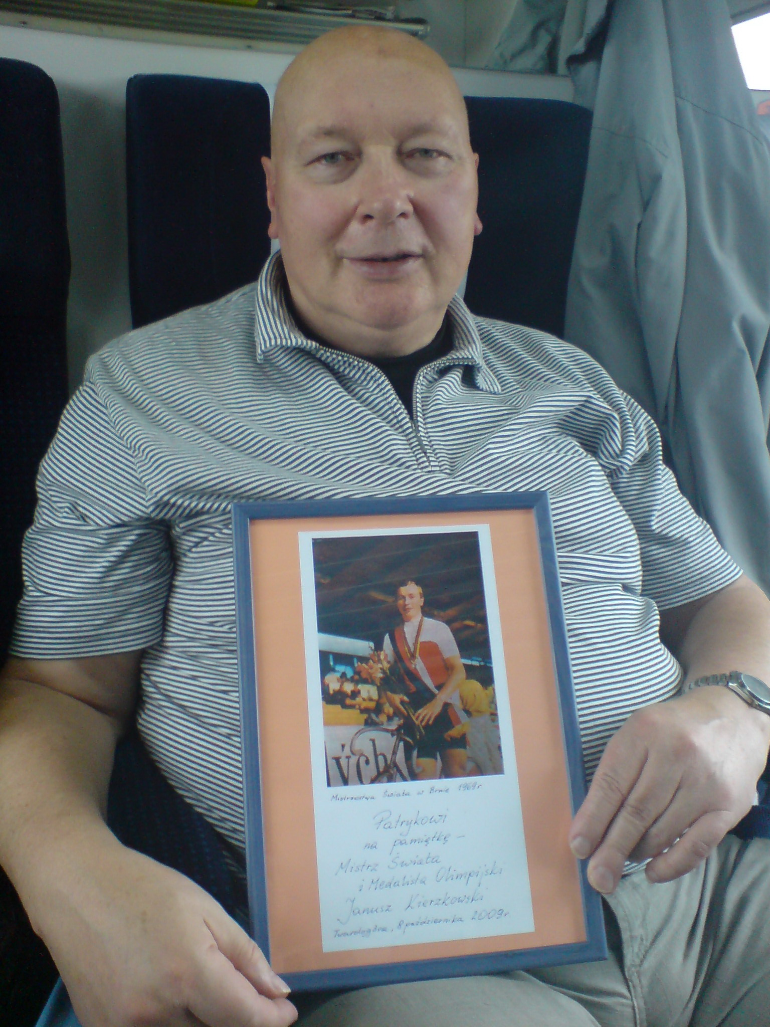 Janusz Kierzkowski prezentuje swoją fotografię z Mistrzostw Świata w Brnie z 1969r.